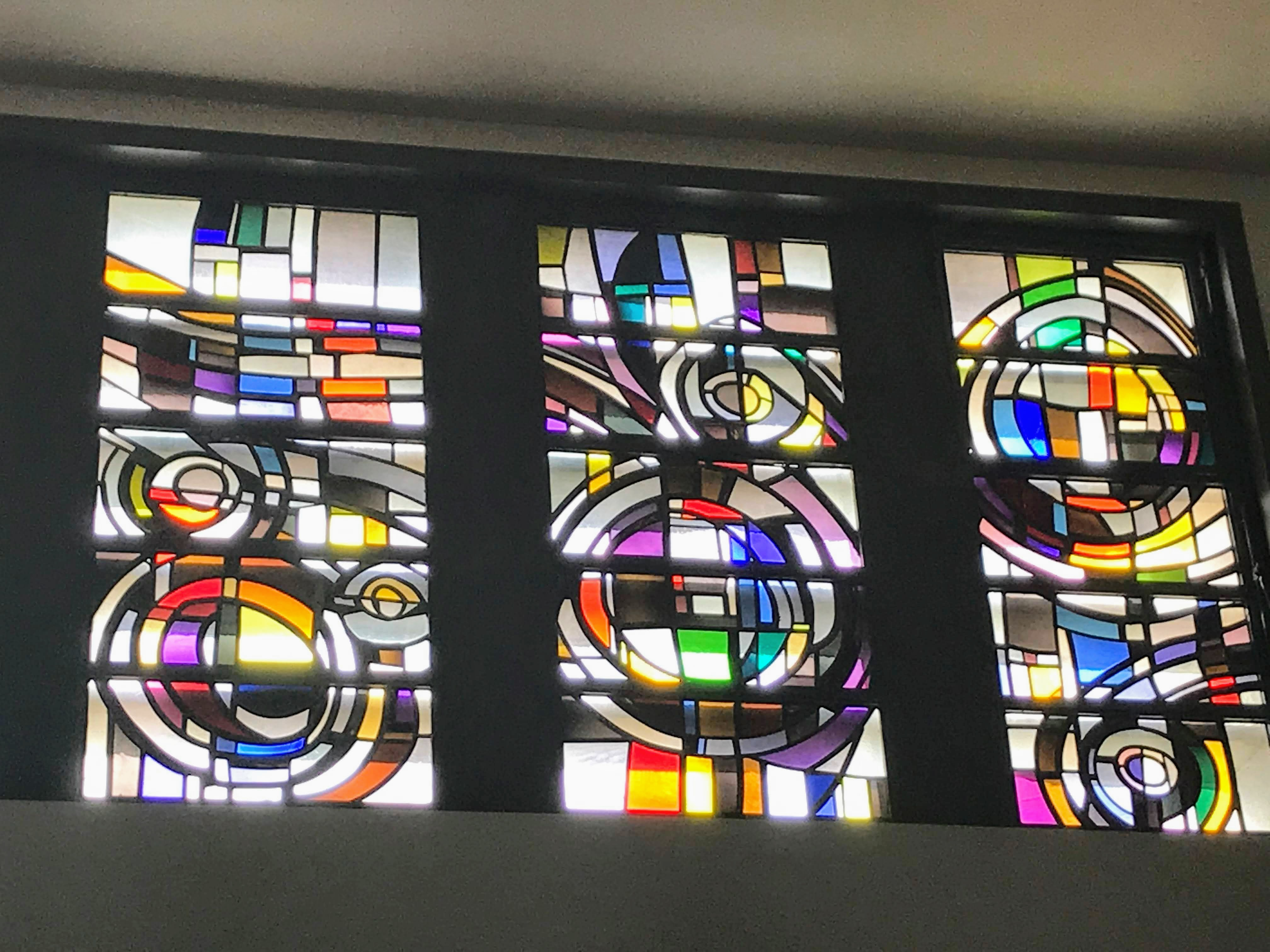 Vitraux de l'église de Marloie